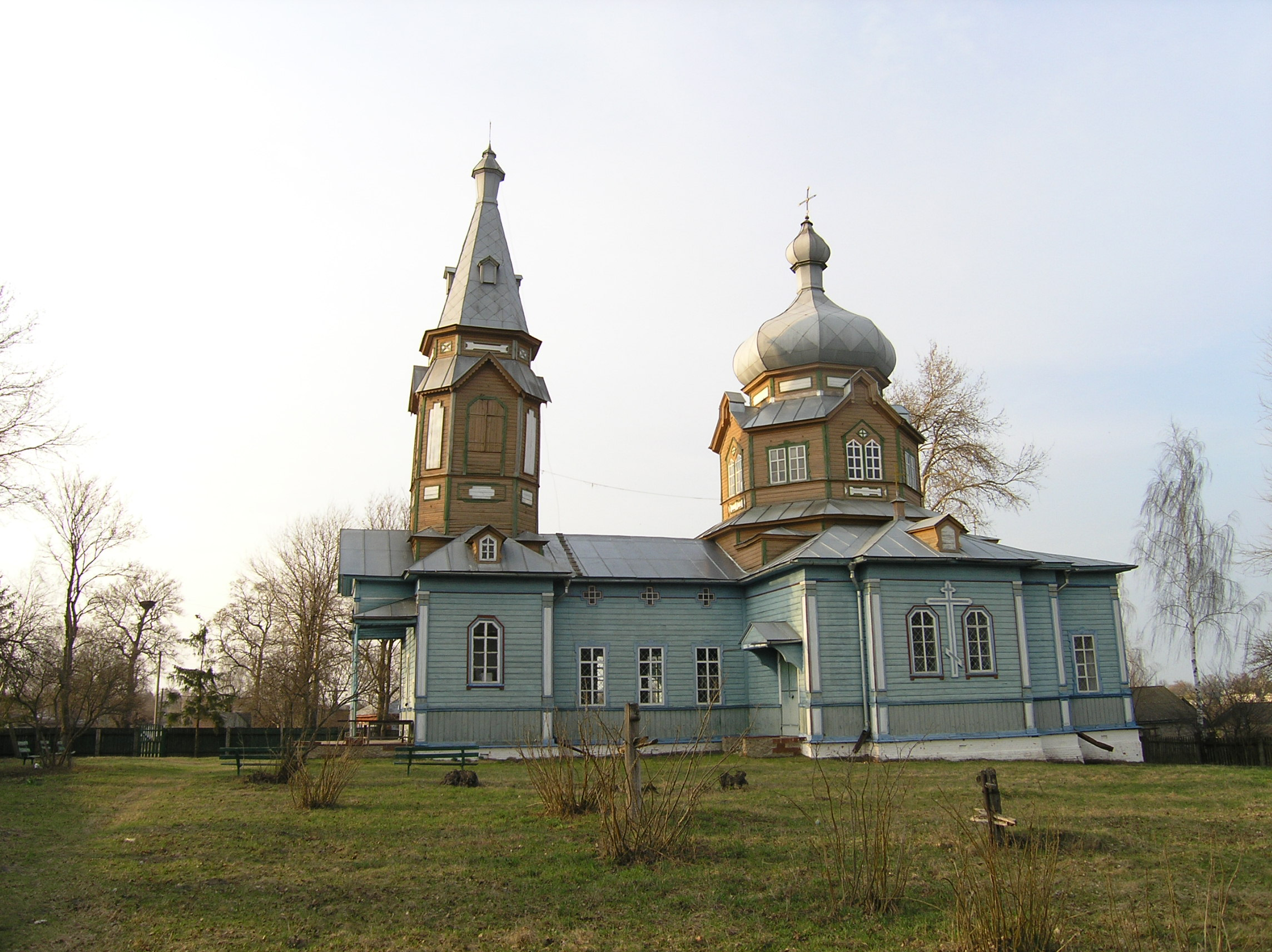 Вознесенський храм: храм с. Роїще